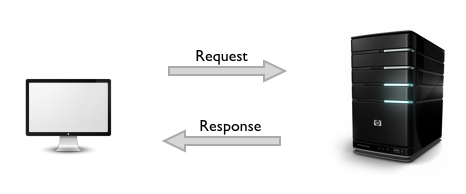 Монгол: zurag2